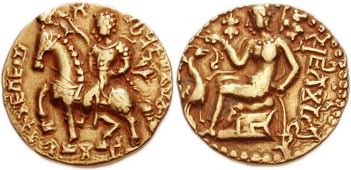 Dinar de ouro de Cumaragupta I